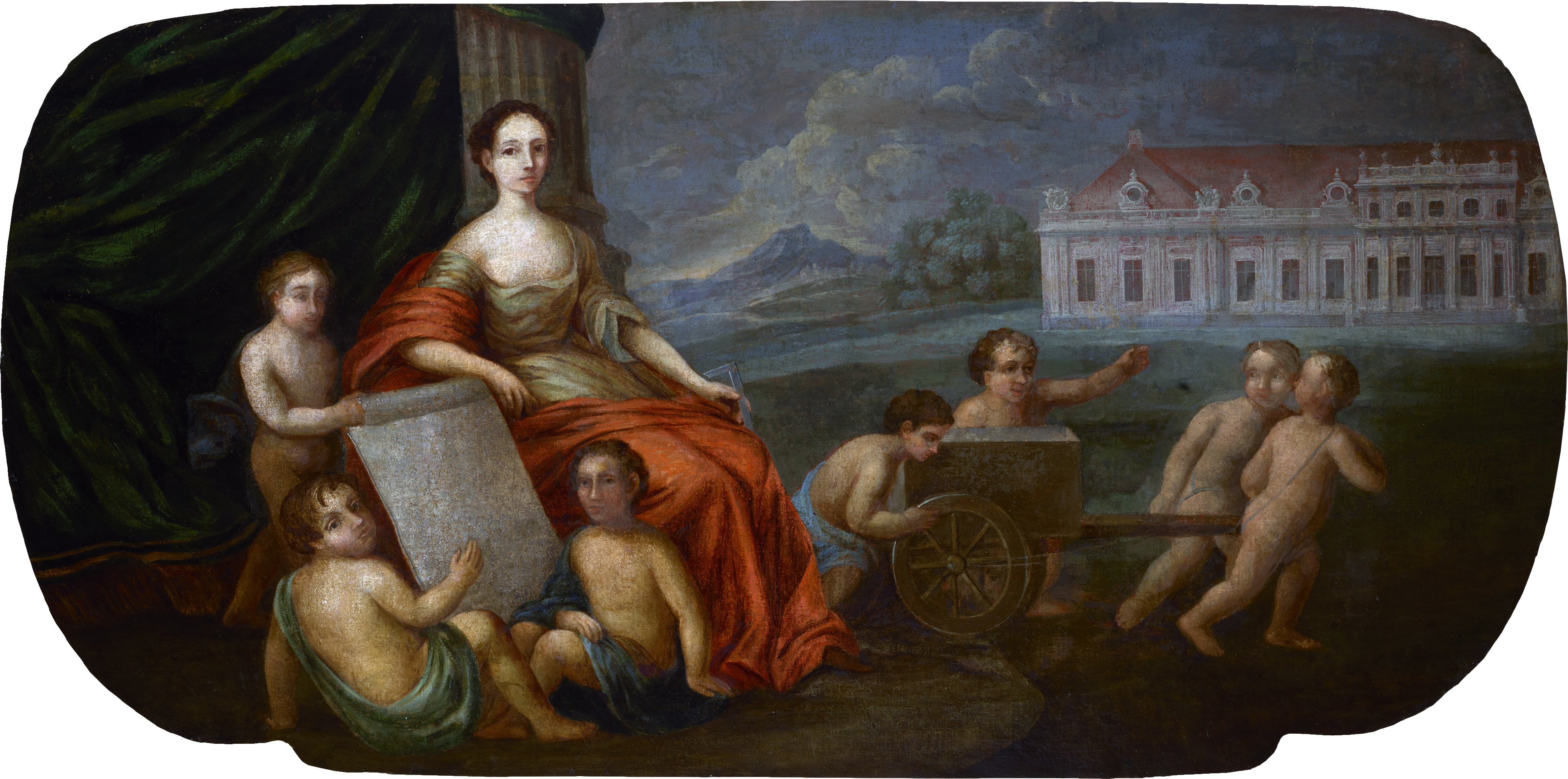 Беларуская (тарашкевіца): Партрэт Элеаноры Чартарыйскай (Eleanora Čartaryjskaja) на фоне палаца ў Воўчыне (Voŭčyn)